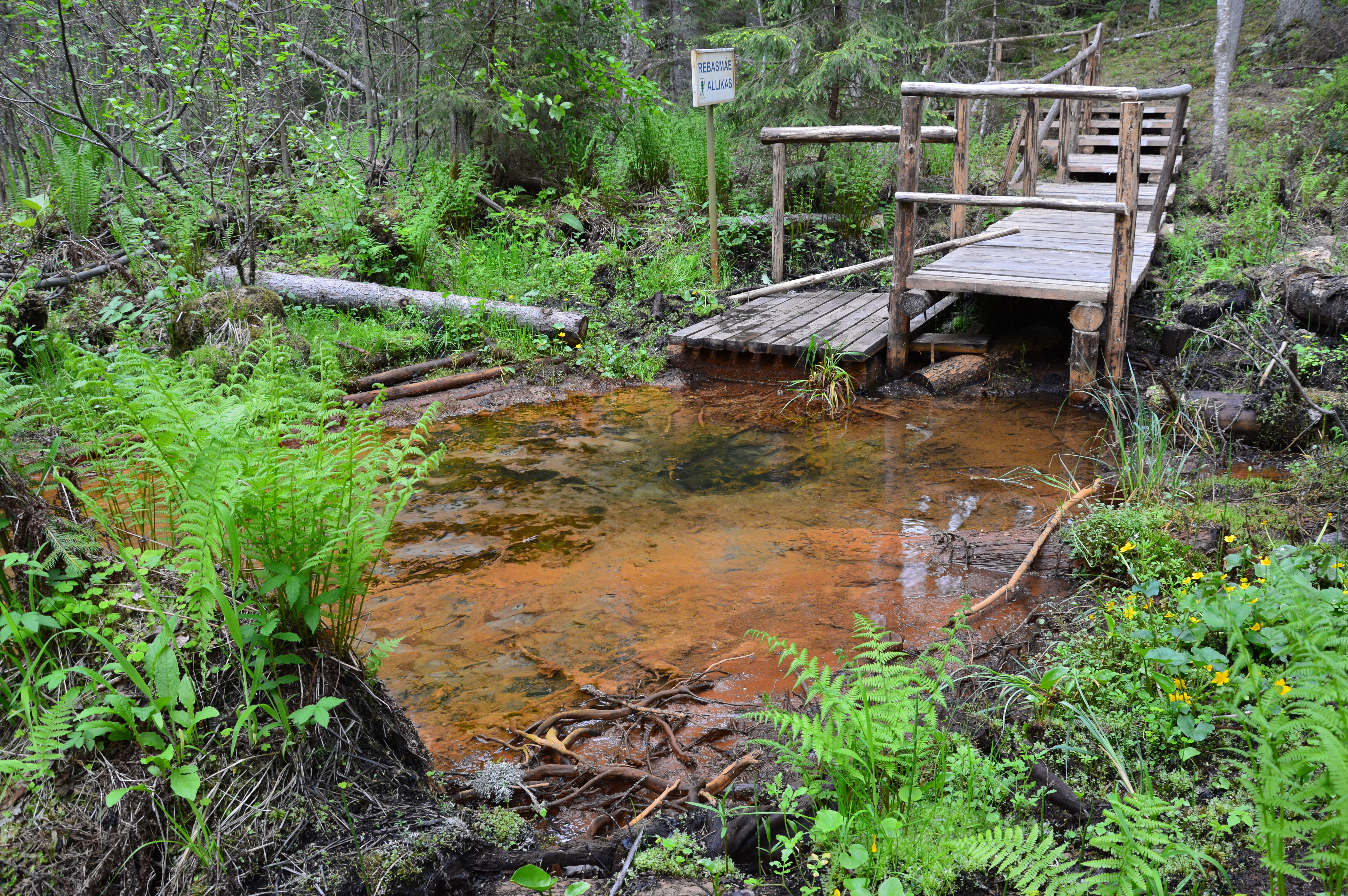 Rebasmäe allikas.